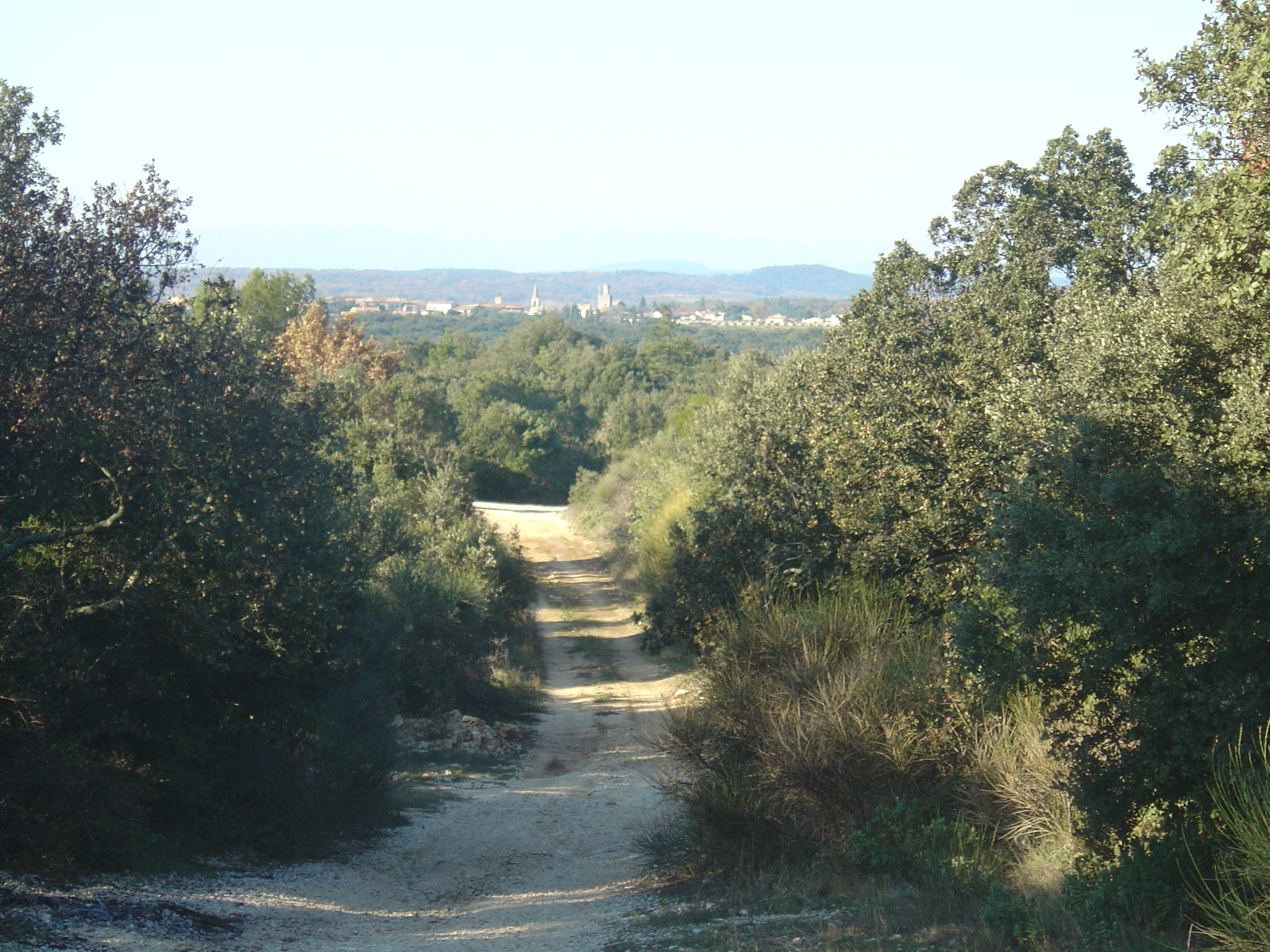 Chemin dans les garrigues entre Saint-Victor la Coste et Pouzilhac dans le Gard (30). Vue sur Pouzilhac au fond.